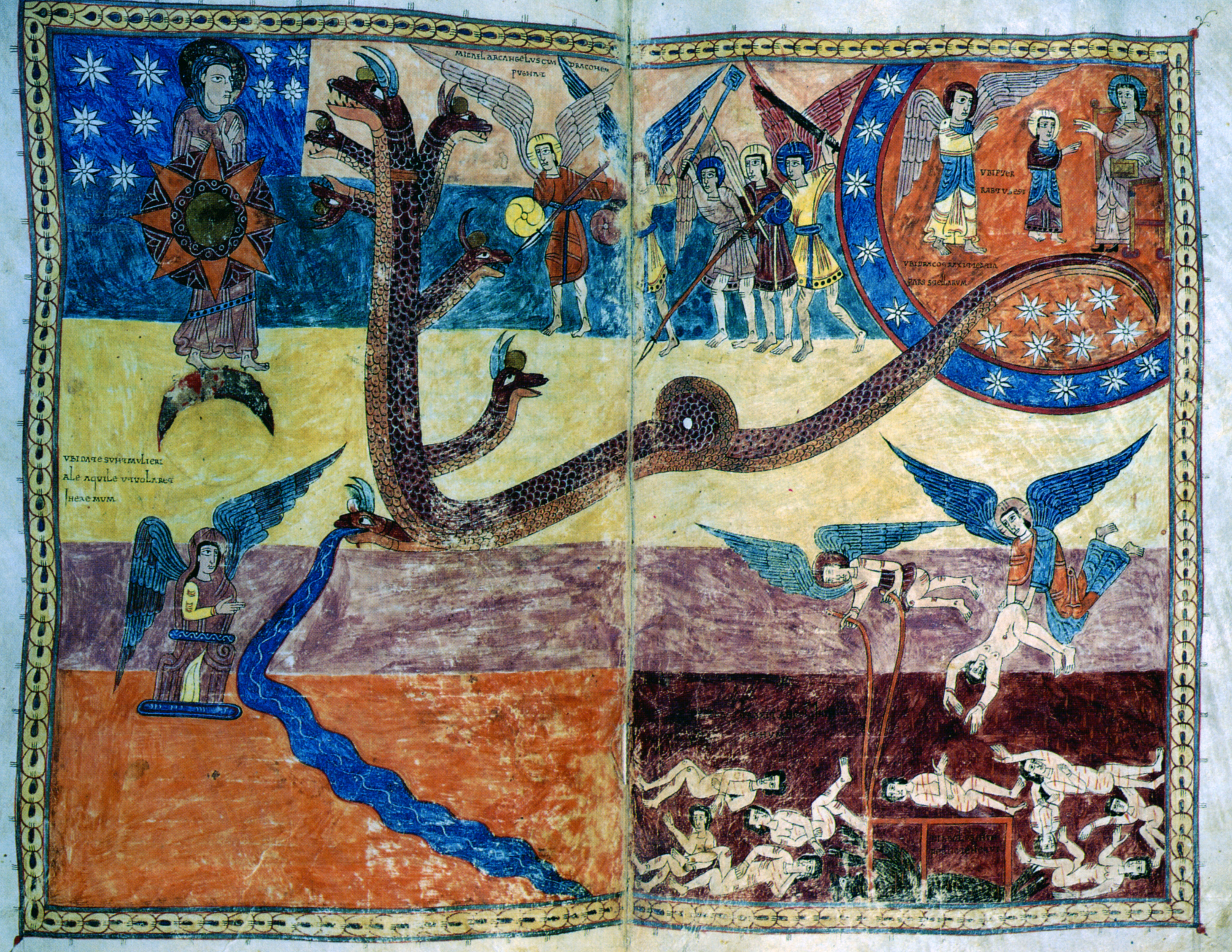 Miniatura del Beato de Gerona, conservado en el tesoro de la catedral de Gerona, que representa a la mujer y al dragón, mencionados en un pasaje del libro del Apocalipsis.